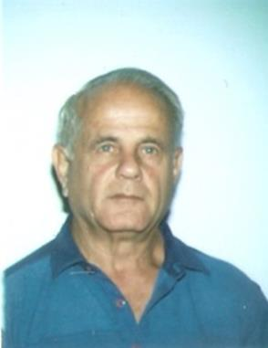 צילום של שורה רפופורט